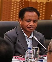 José Cornélio Guterres bei der Sitzung des Staatsrats